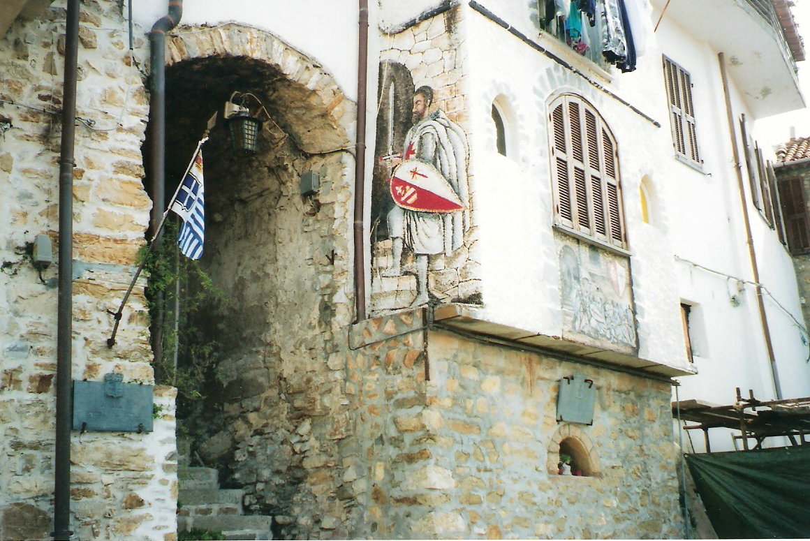 Foto cavaliere dipinto su facciata nel borgo di Seborga